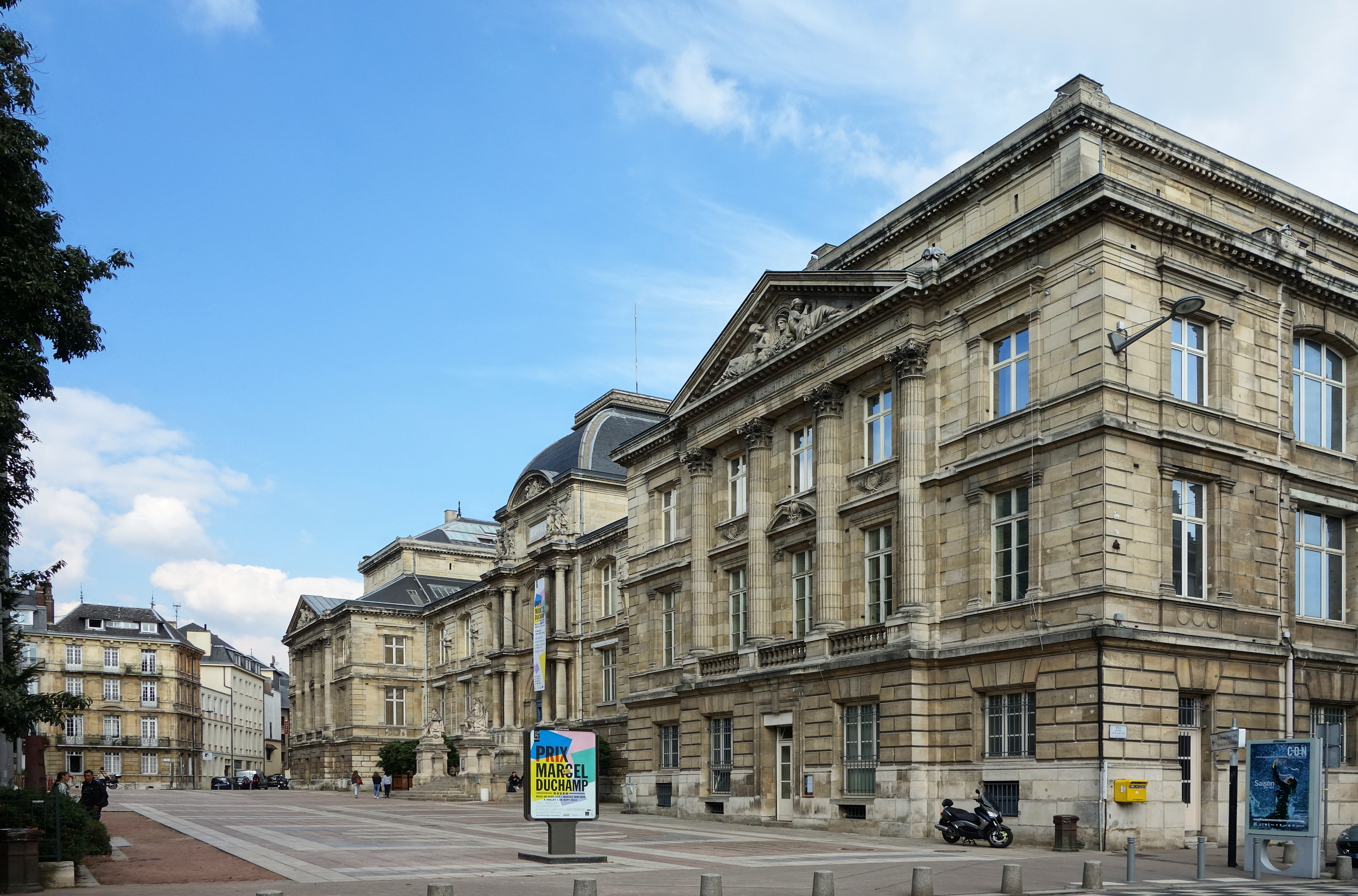 Le Musée des Beaux-Arts de Rouen.